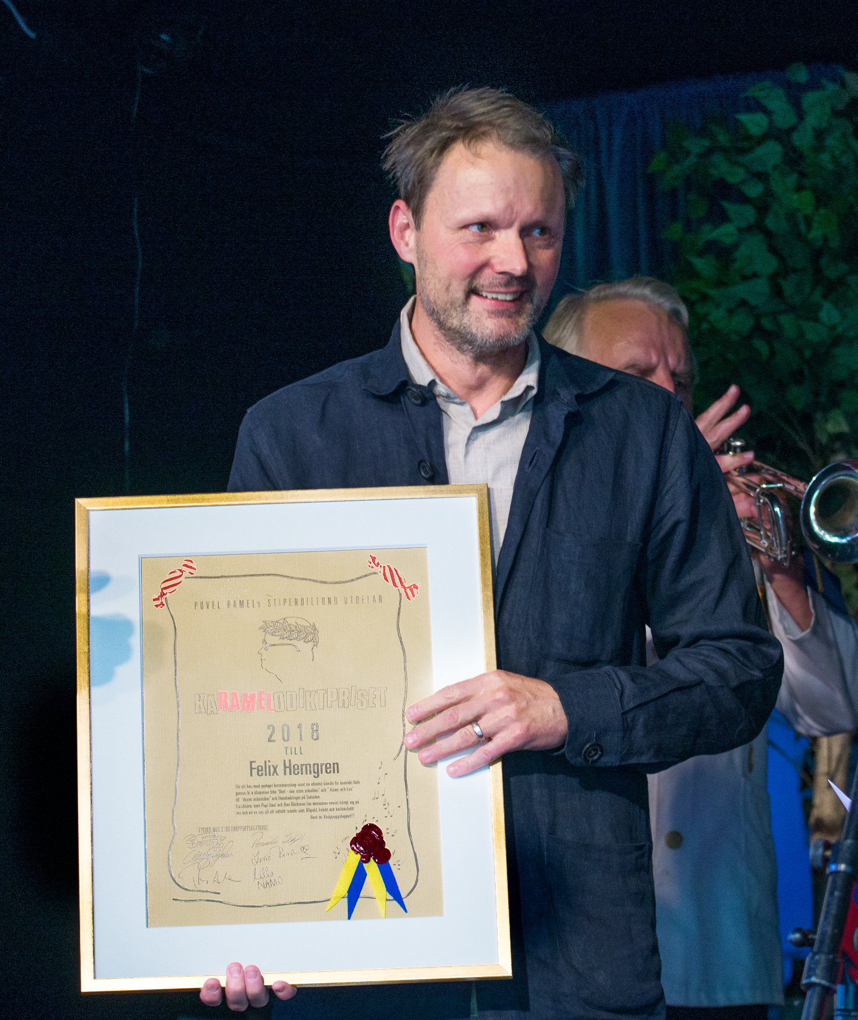 Felix Herngren får KaRAMELodiktstipendiet 2018.